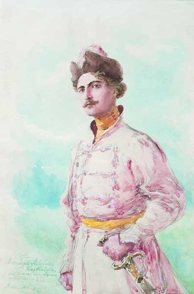 «Стрелец», 1913 г. бумага, масло; 51х34; слева внизу «Александръ Львовнъ Карбоньеръ*